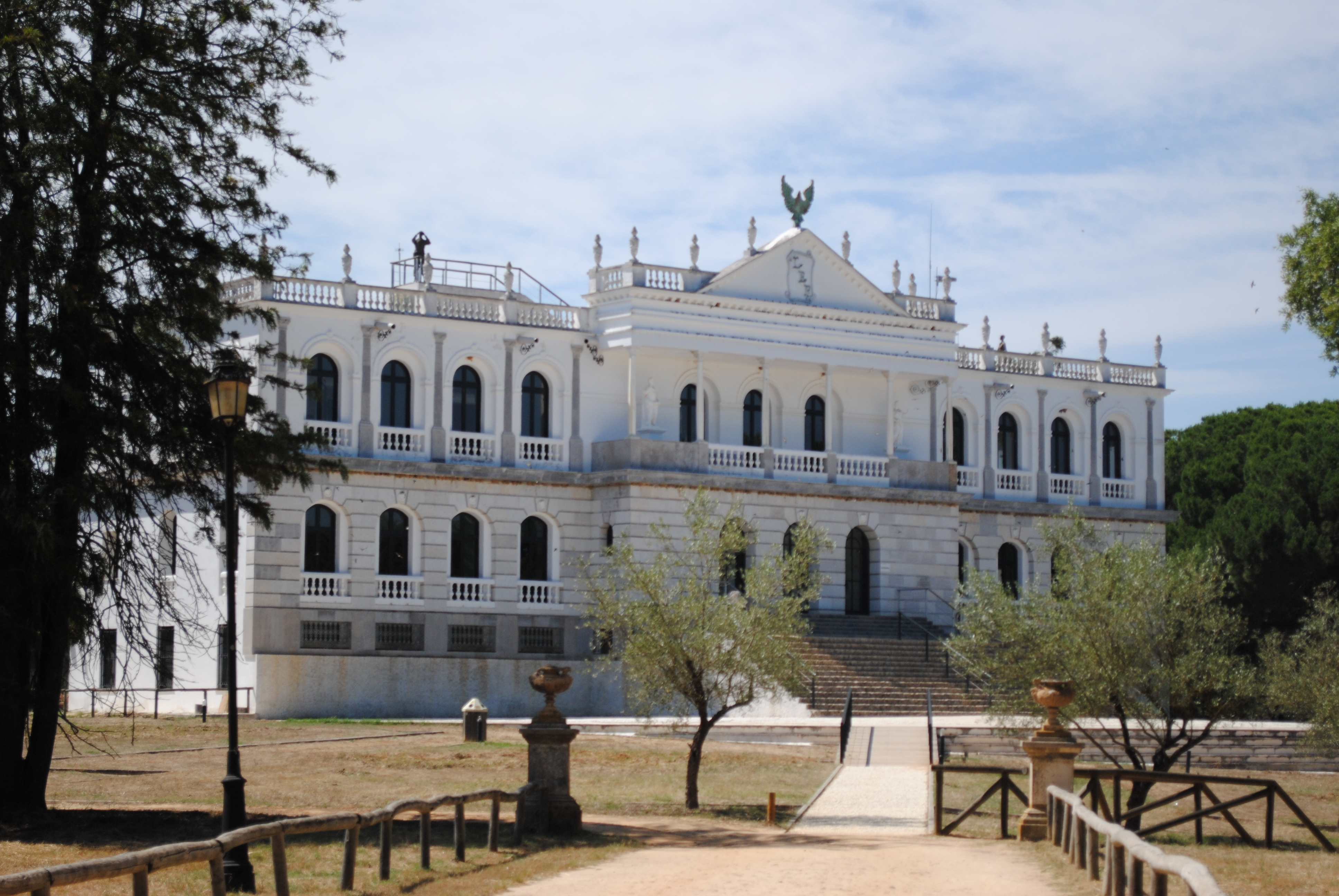 Palacio del Acebrón - Doñana (Huelva)